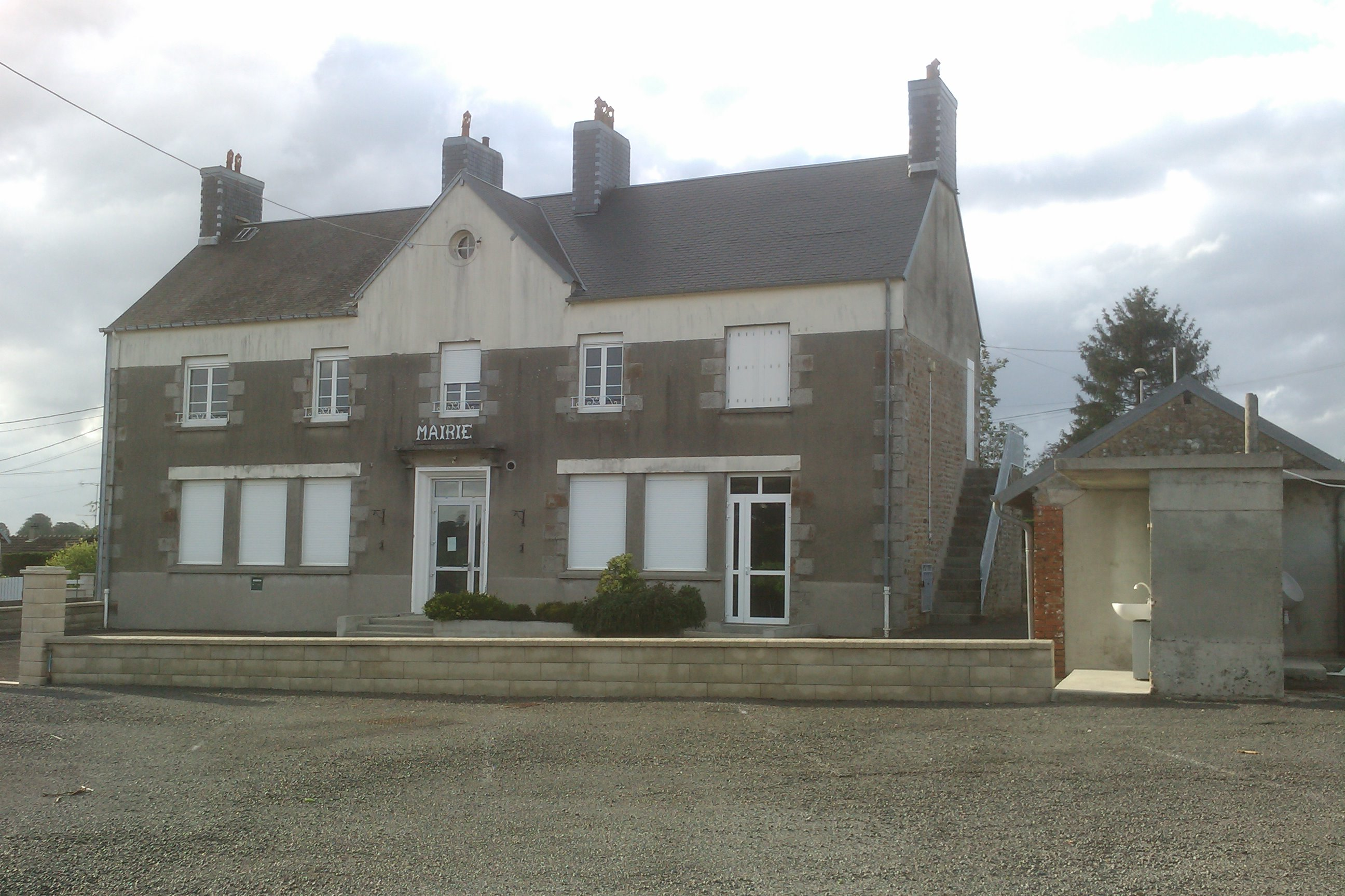 Rouffigny